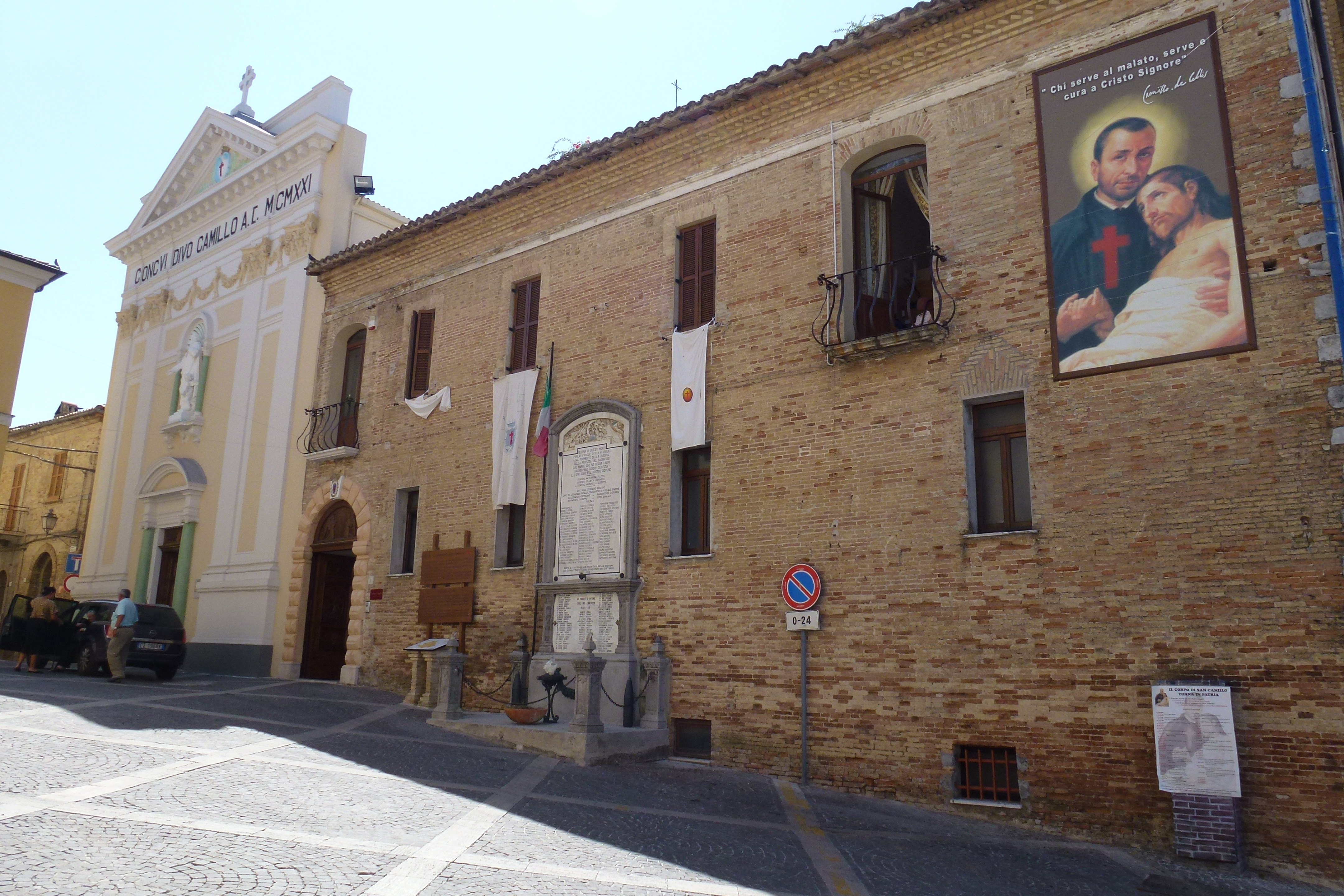 Bucchianico